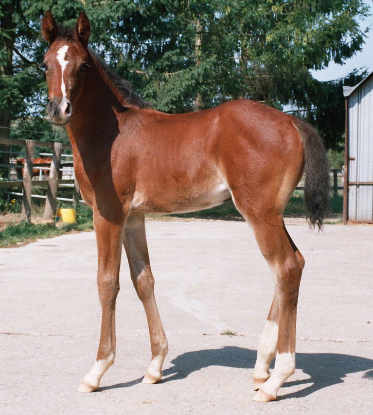 Un poulain de race arabe shagya